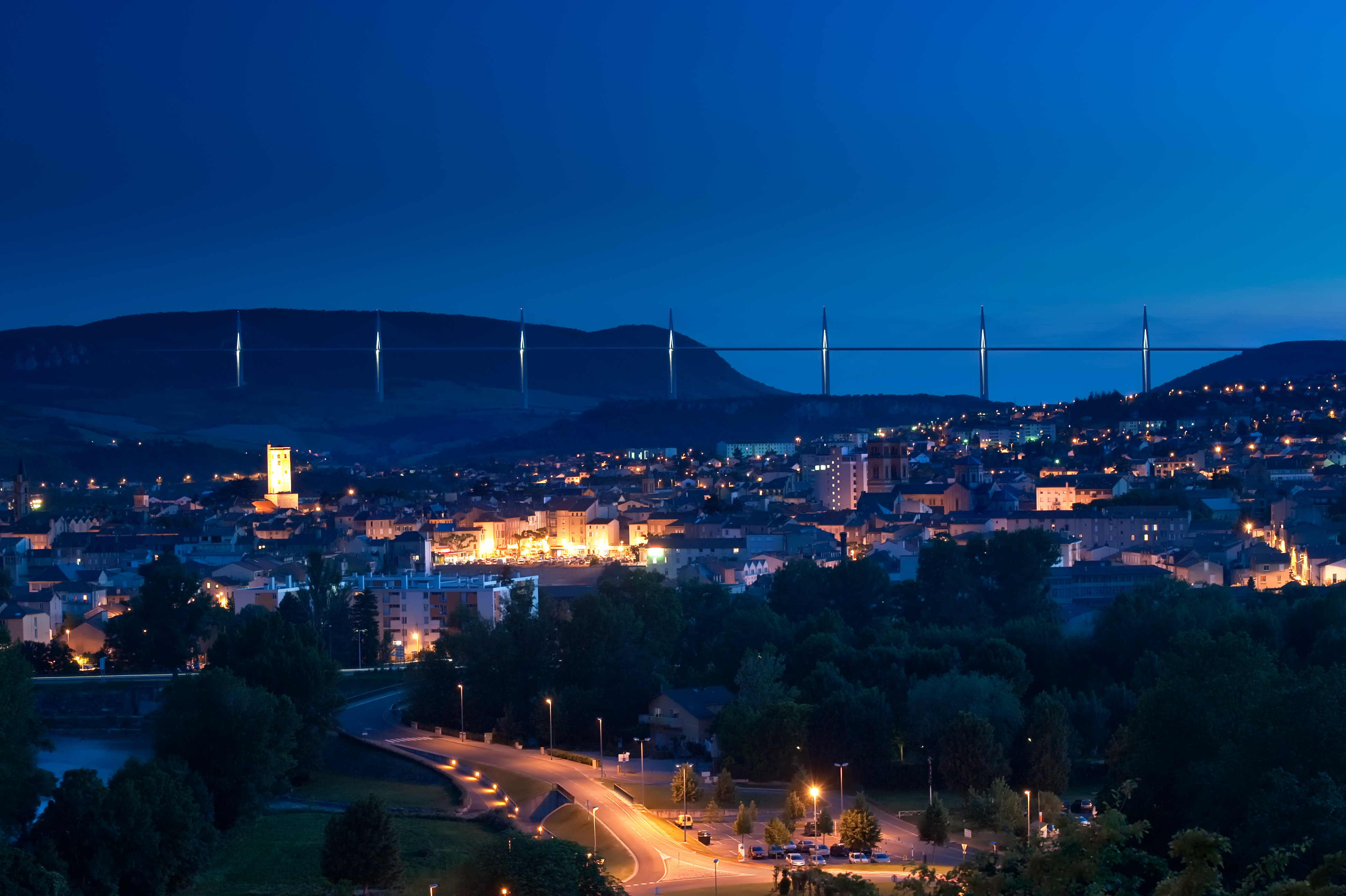 Blick auf Millau vom Puncho d'Agast mit der Autobahnbrücke im Hintergrund